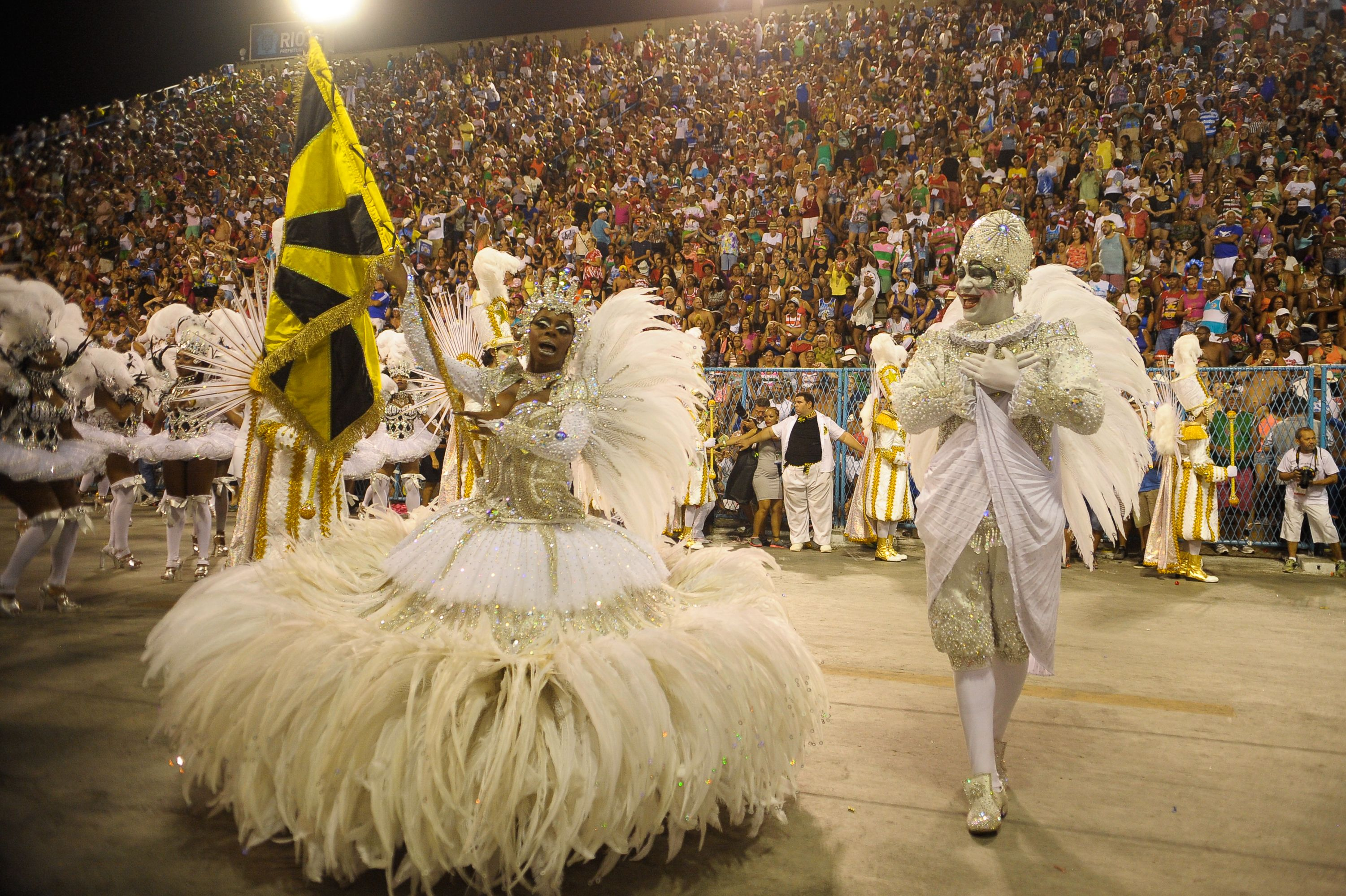 Rio de Janeiro - São Clemente é a terceira escola a se apresentar na Marquês de Sapucaí com o enredo Mais de Mil Palhaços no Salão (Tomaz Silva/Agência Brasil)